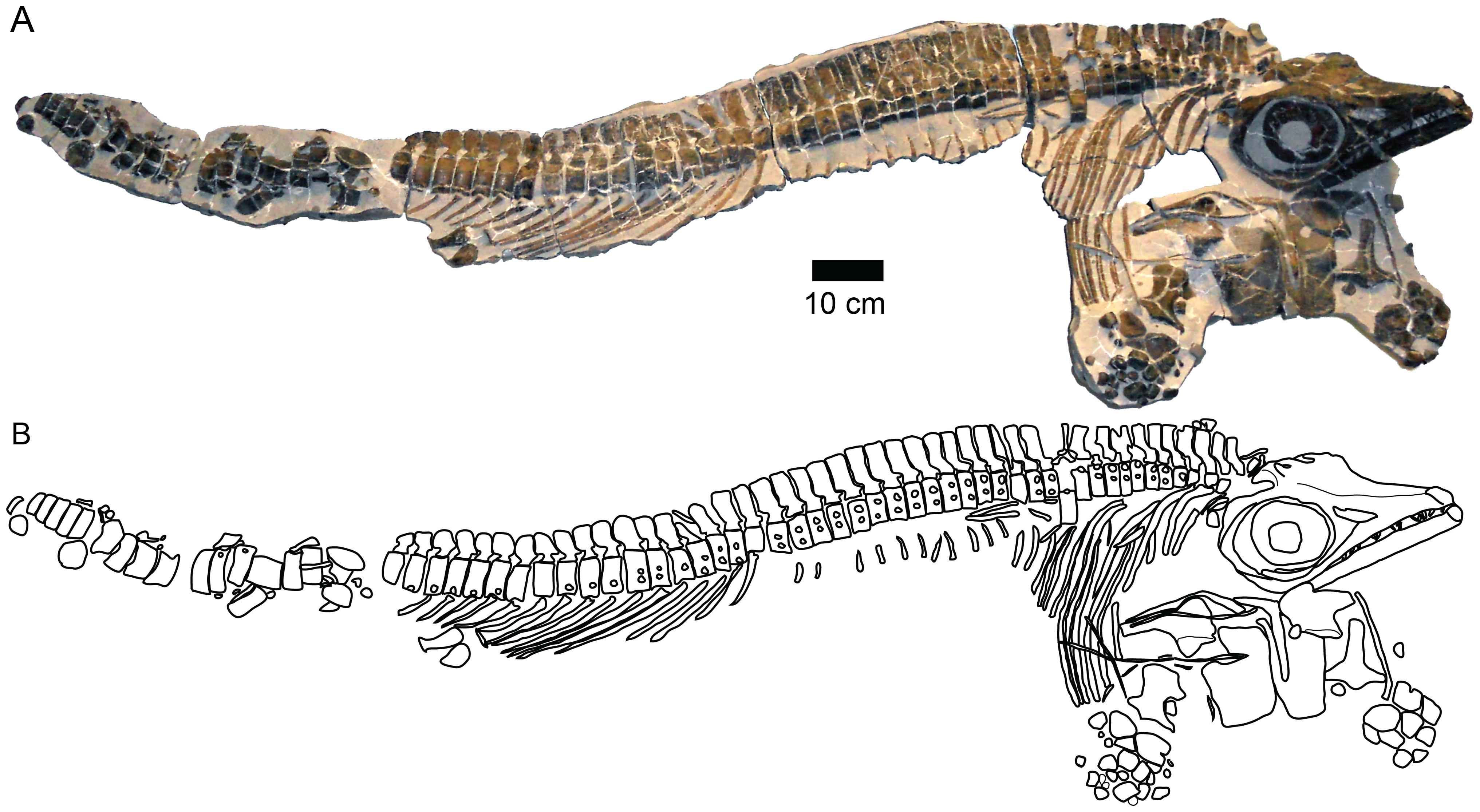 SMNS 90699, holotype, Stenopterygius aaleniensis sp. nov.